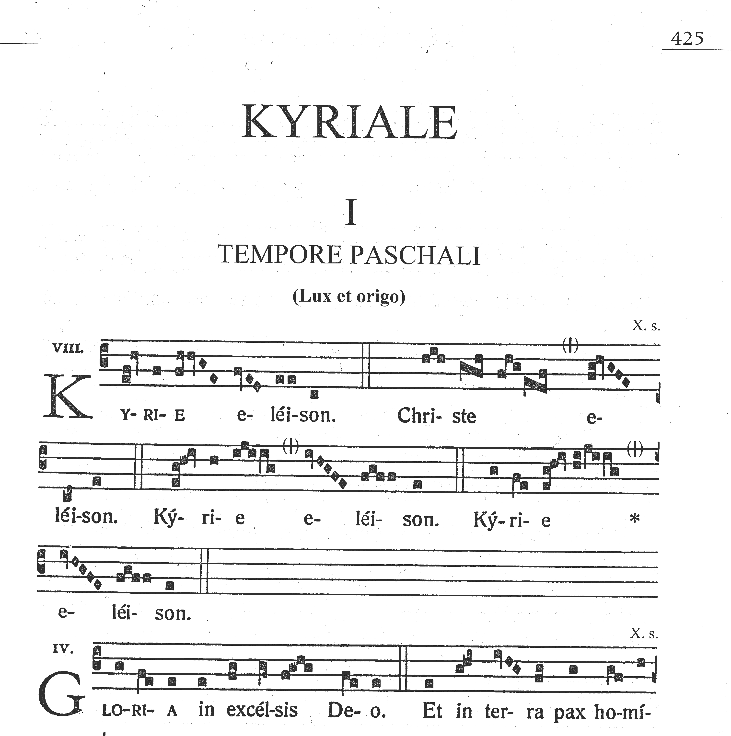 Beginn des KYRIALE in: Graduale Novum. Editio magis critica iuxta SC 117, Tomus I. De Dominicis et Festis, ConBrio Verlagsgesellschaft Regensburg in Kooperation mit derf Libreria Editrice Vaticana, MMXI, Regensburg 2011, ISBN 978-3-940768-15-5, S. 425.